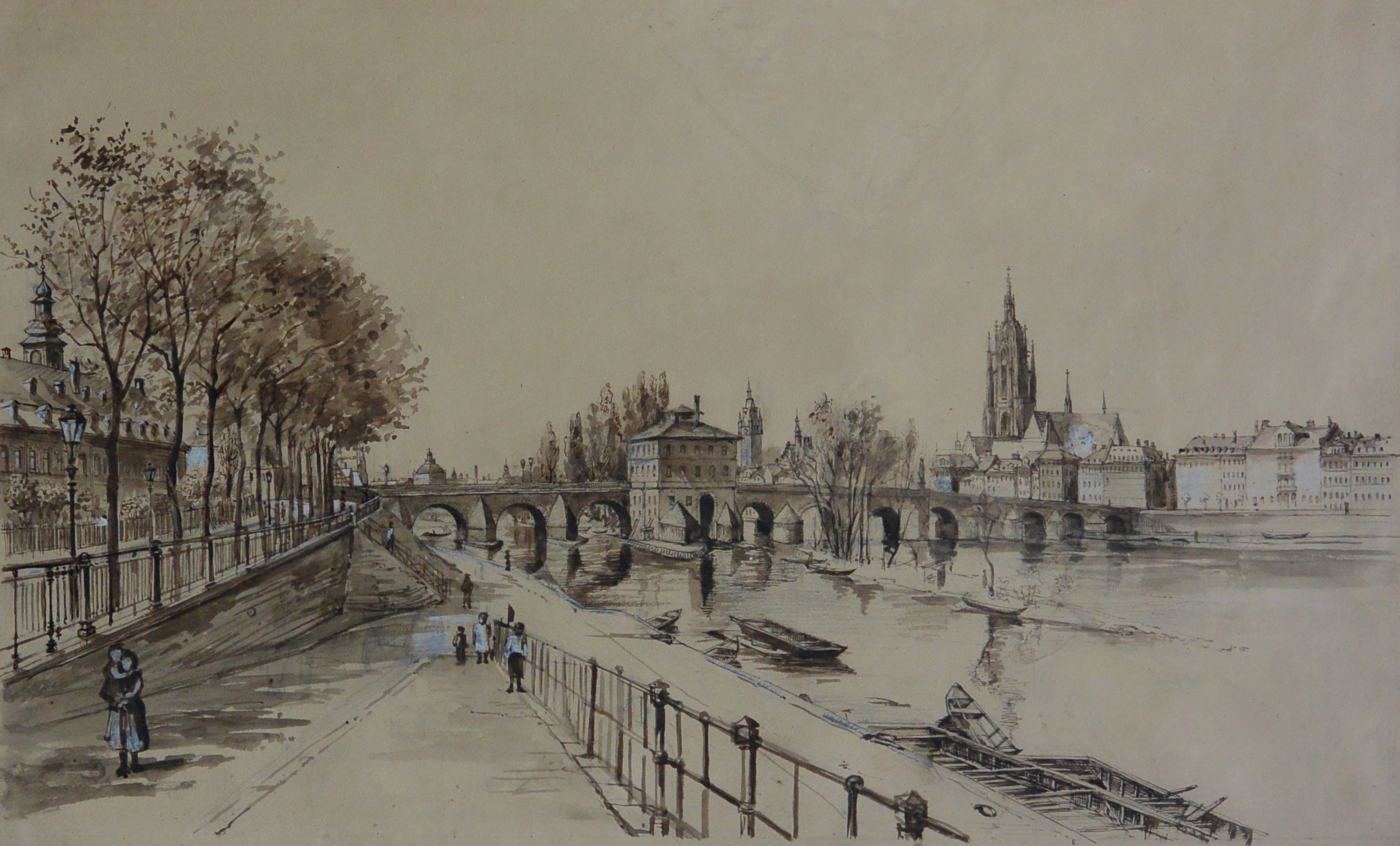 Fritz Wucherer (attr.), Tuschezeichnung, partiell weiß gehöht, um 1890